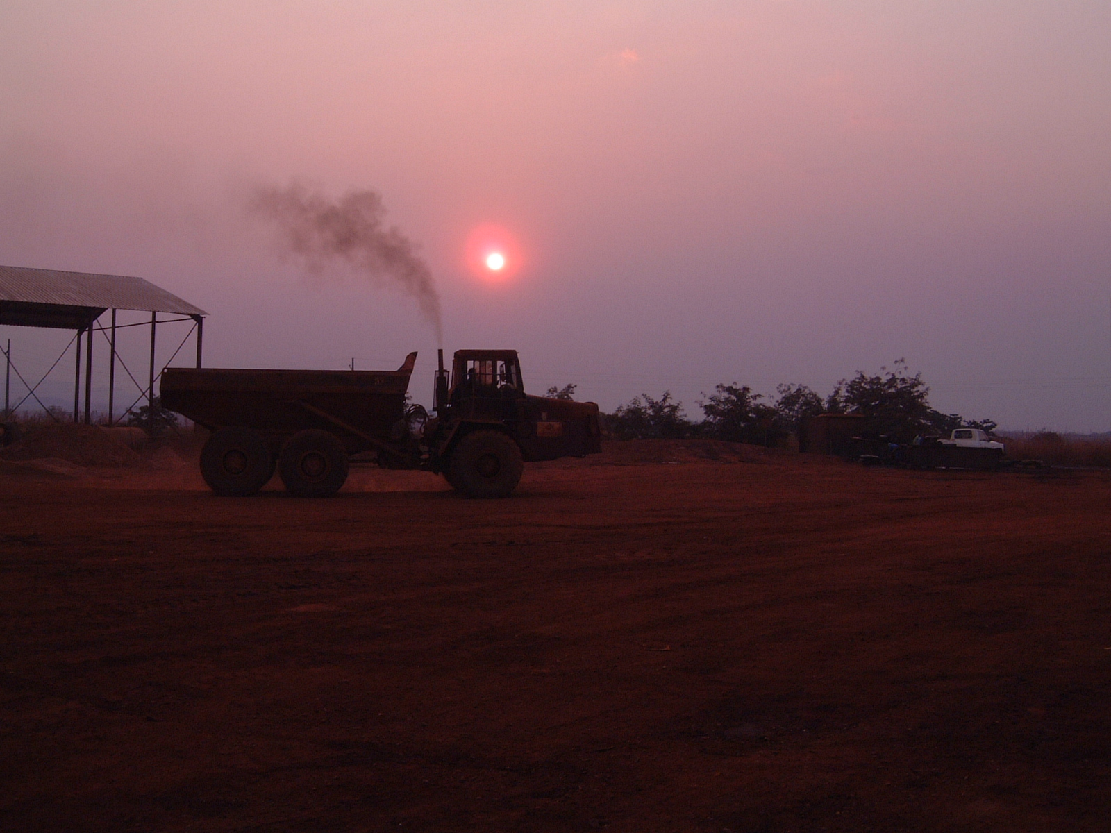 Chitotolo